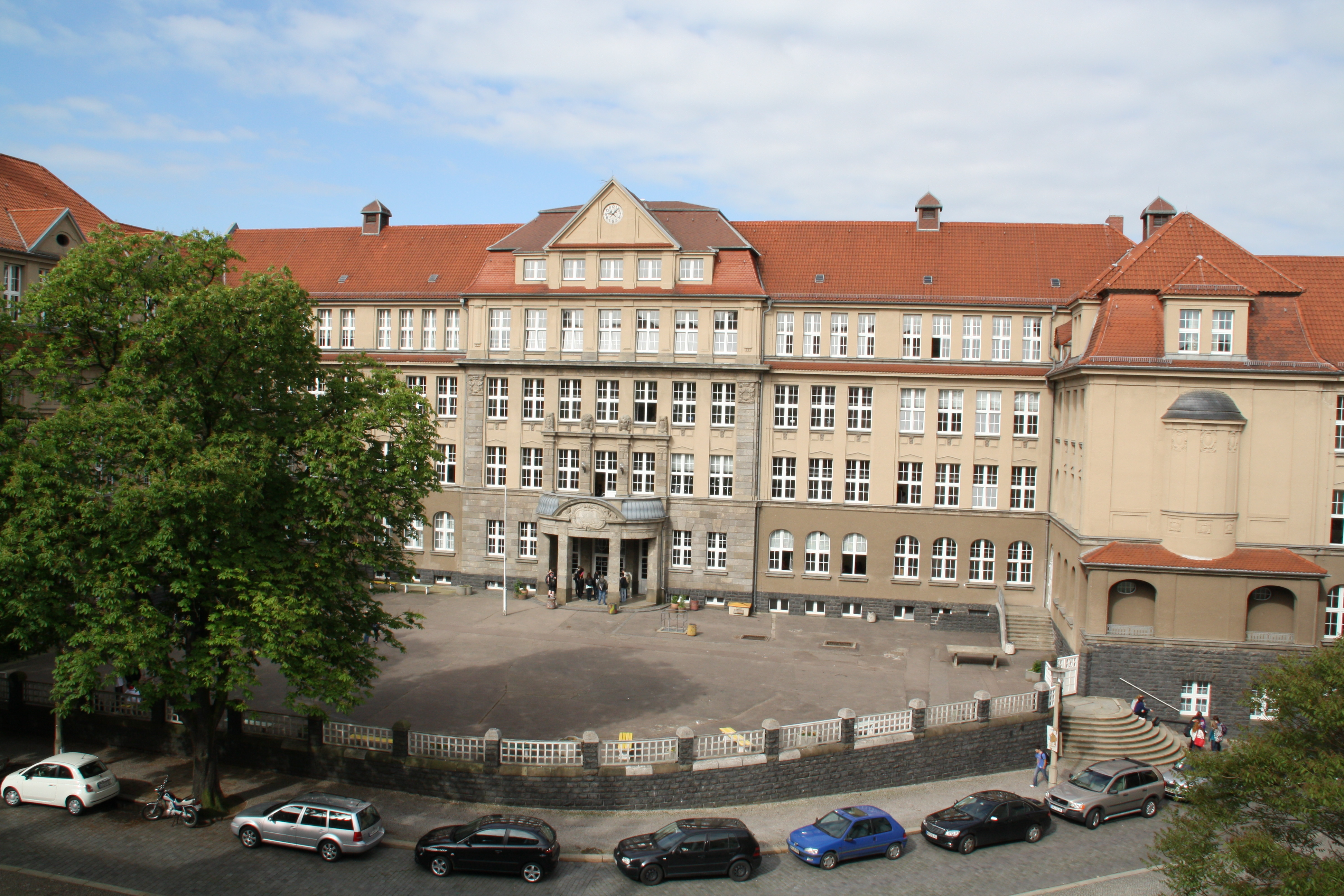 Ansicht des Hans-Dietrich-Genscher-Gymnasiums in Halle an der Saale.